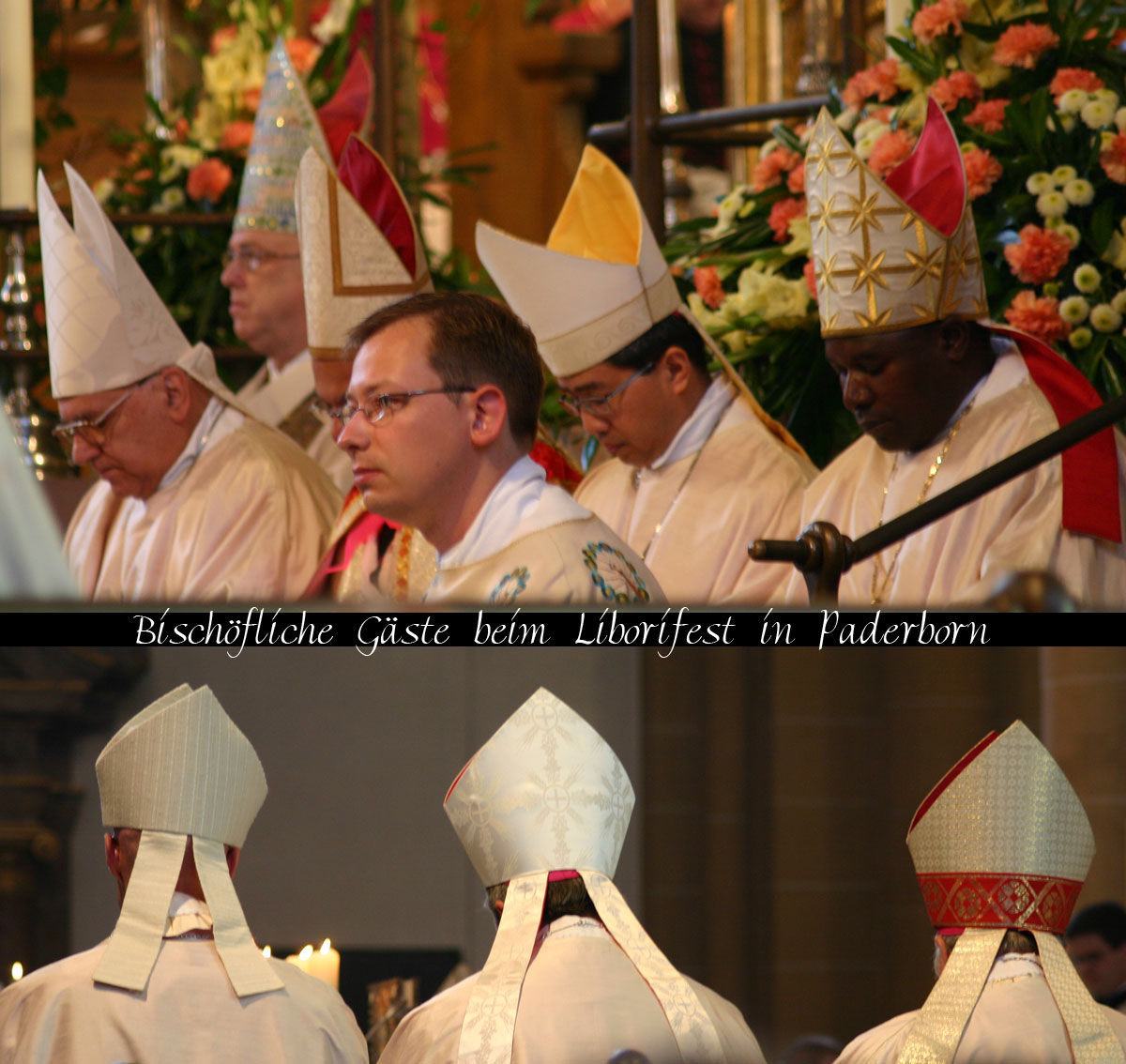 Das Bild zeigt die Bischöfe beim Pontifikalamt des Liborifestes 2005, Paderborn, Dom.